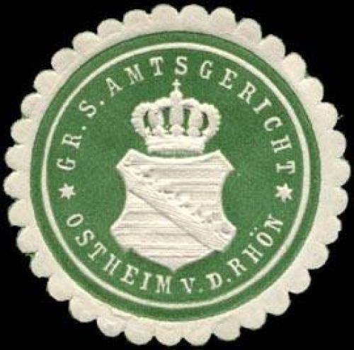 Siegelmarke des Großherzoglich Sächischen Amtsgerichts Ostheim vor der Röhn